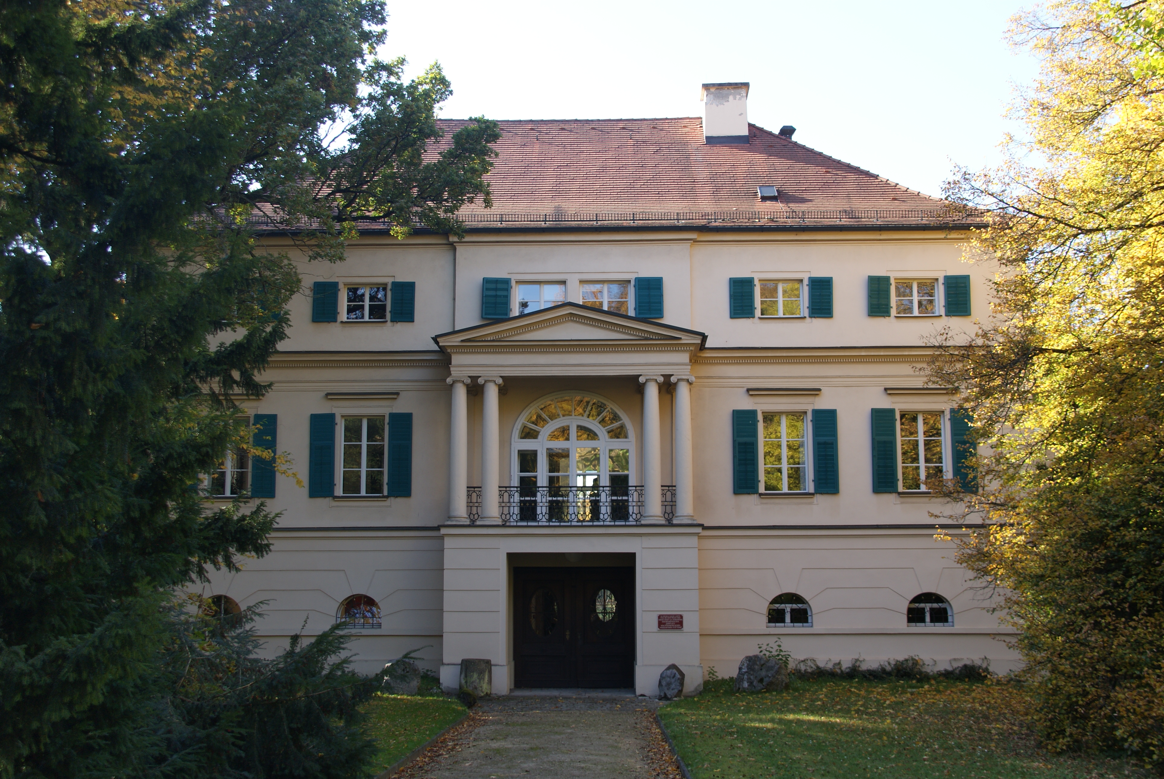 Dörnberg Palais in Regensburg, Seitenflügel verdeckt This is a photograph of an architectural monument.